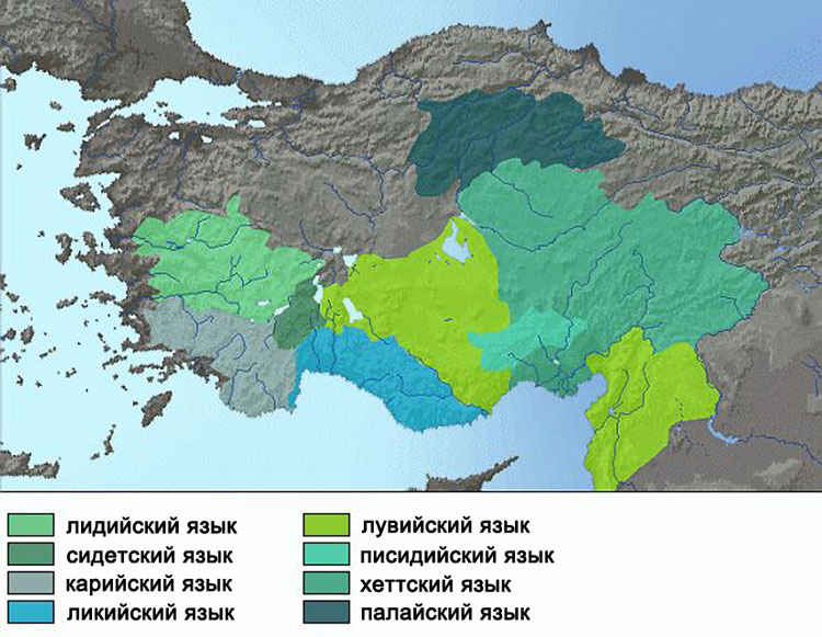 Карта распространения анатолийских (хетто-лувийских) языков, отражающая различные временные периоды: II тысячелетие до н. э.: хеттский, палайский и лувийский языки. I тысячелетие до н. э.: лидийский, карийский, ликийский, сидетский и писидийский языки.